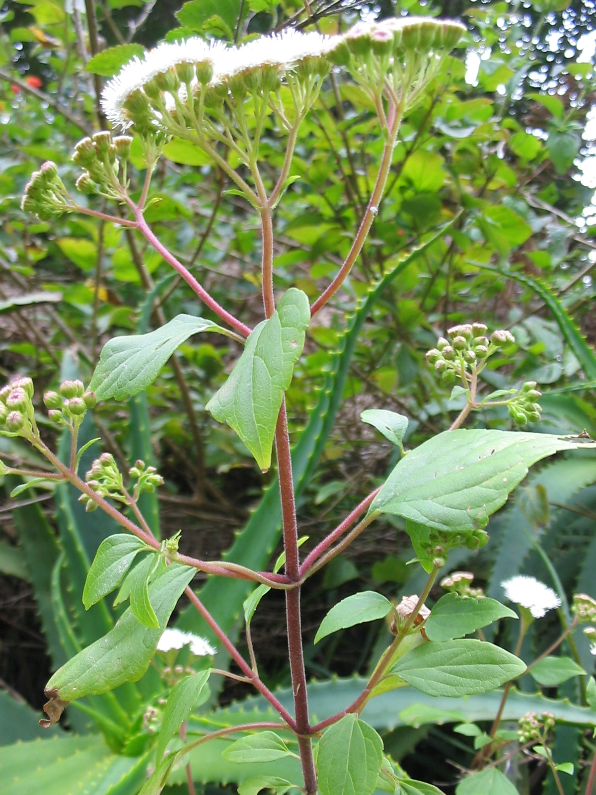 Drüsiger Wasserdost (Ageratina adenophora) - Buds